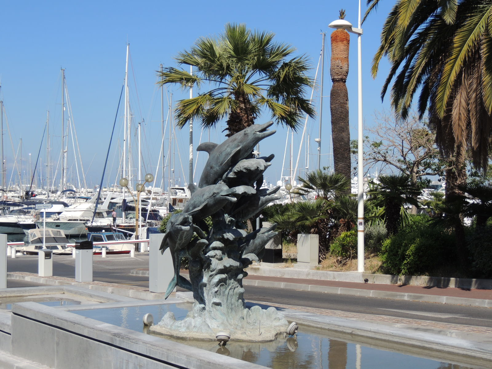 fontaine sculpture dauphins